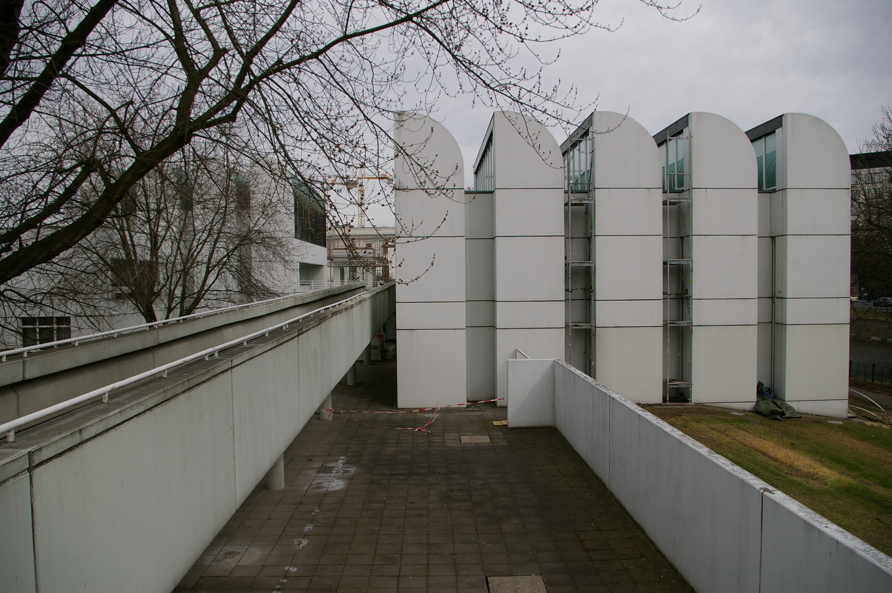 Bauhaus-Archiv, Berlin